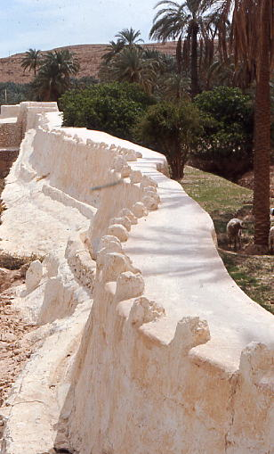 Ghardaïa, Algérie : Béni Isguen, le barrage